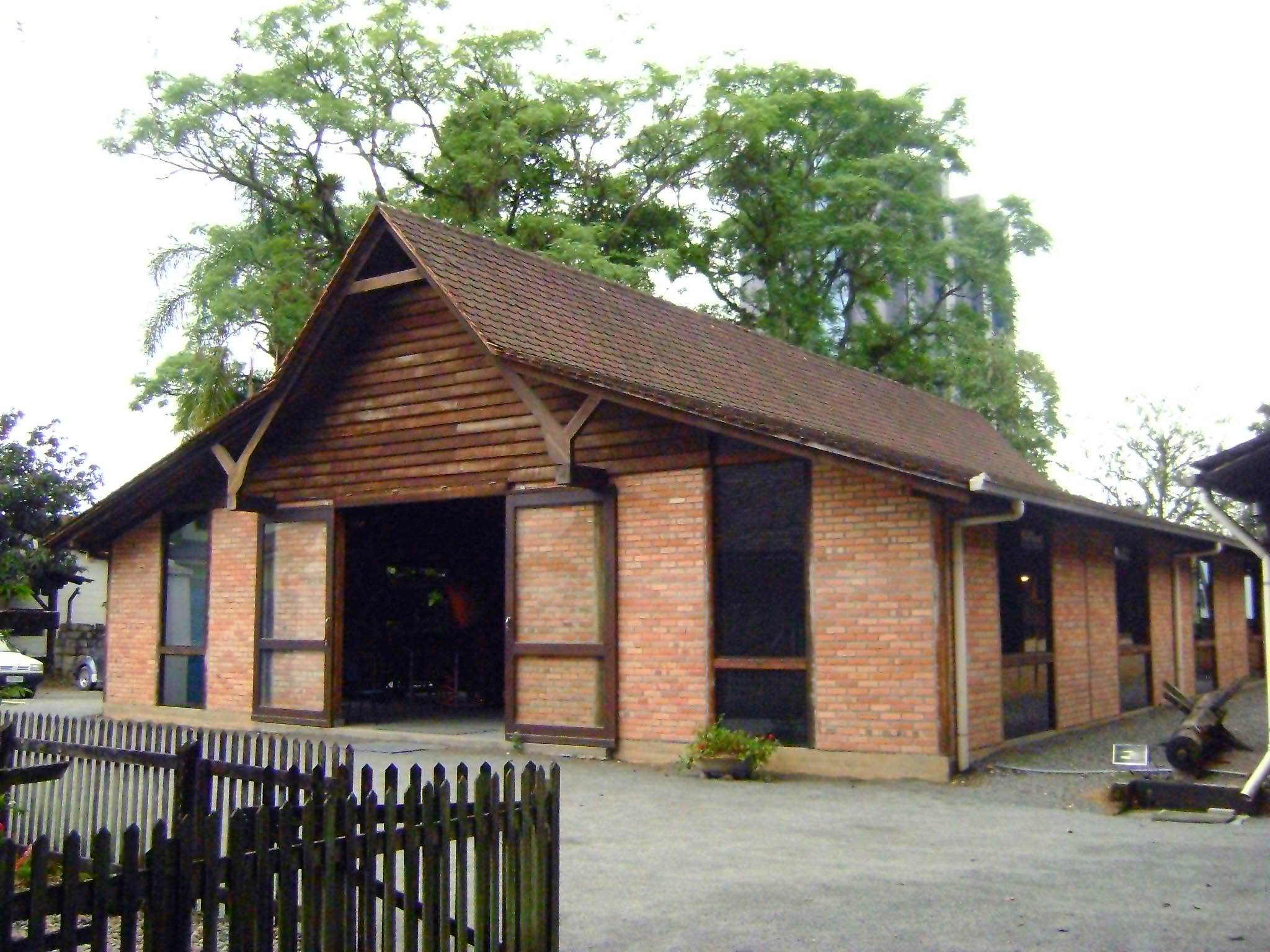 Galpão de Transportes localizado no Museu Nacional de Imigração e Colonização de Joinville.